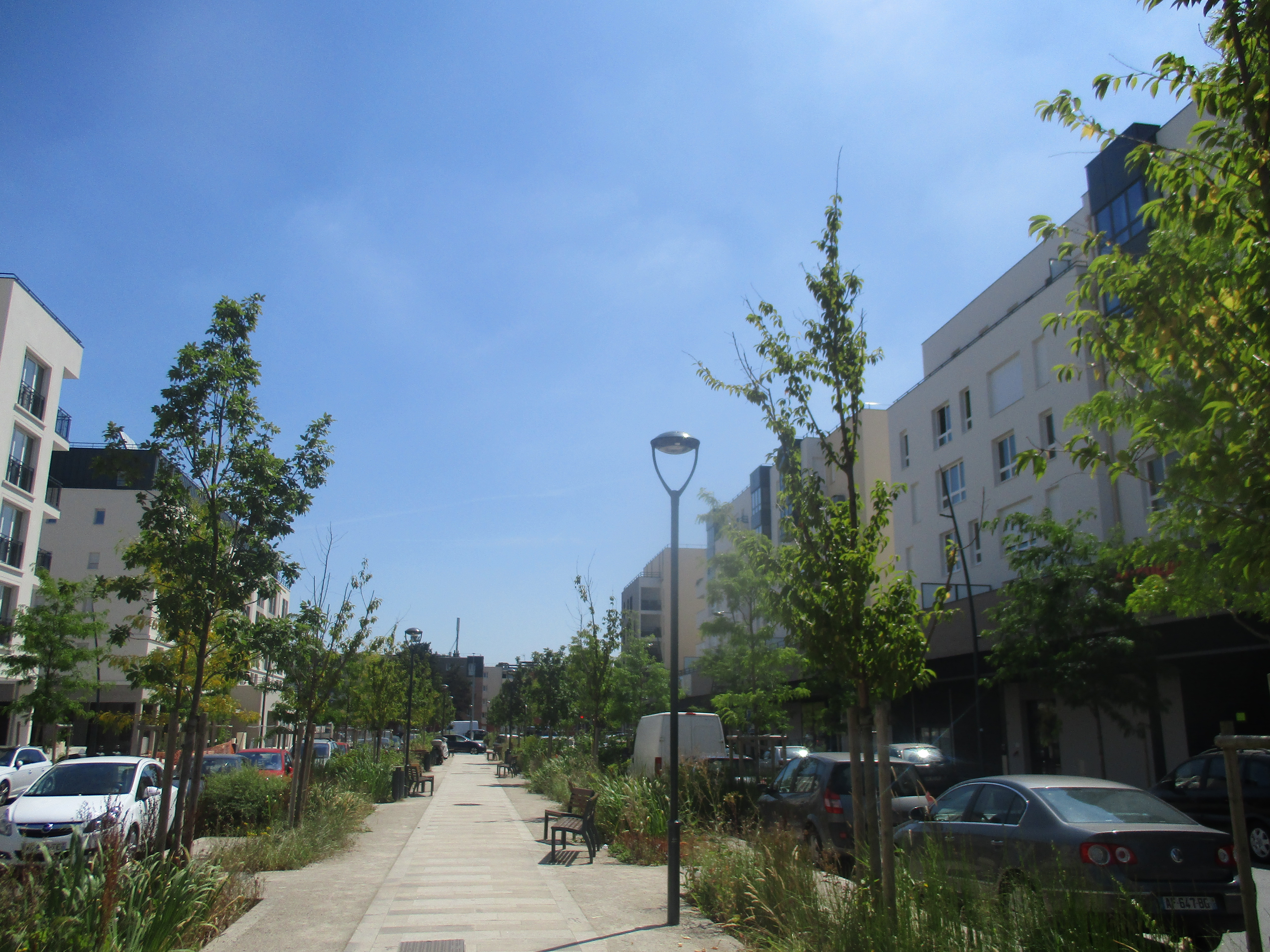 Fleury-Mérogis: quartier des Aunettes, nouvellement réhabilité.